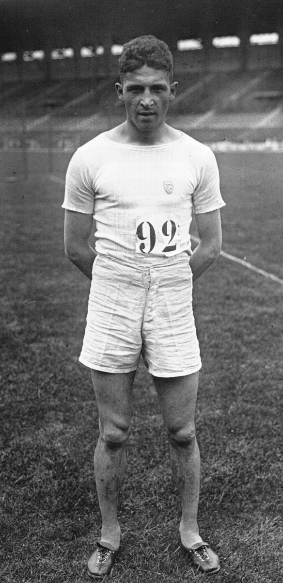 Colombes, championnat de Paris d'athlétisme : Séraphin Martin (portrait) : [photographie de presse] / Agence Meurisse